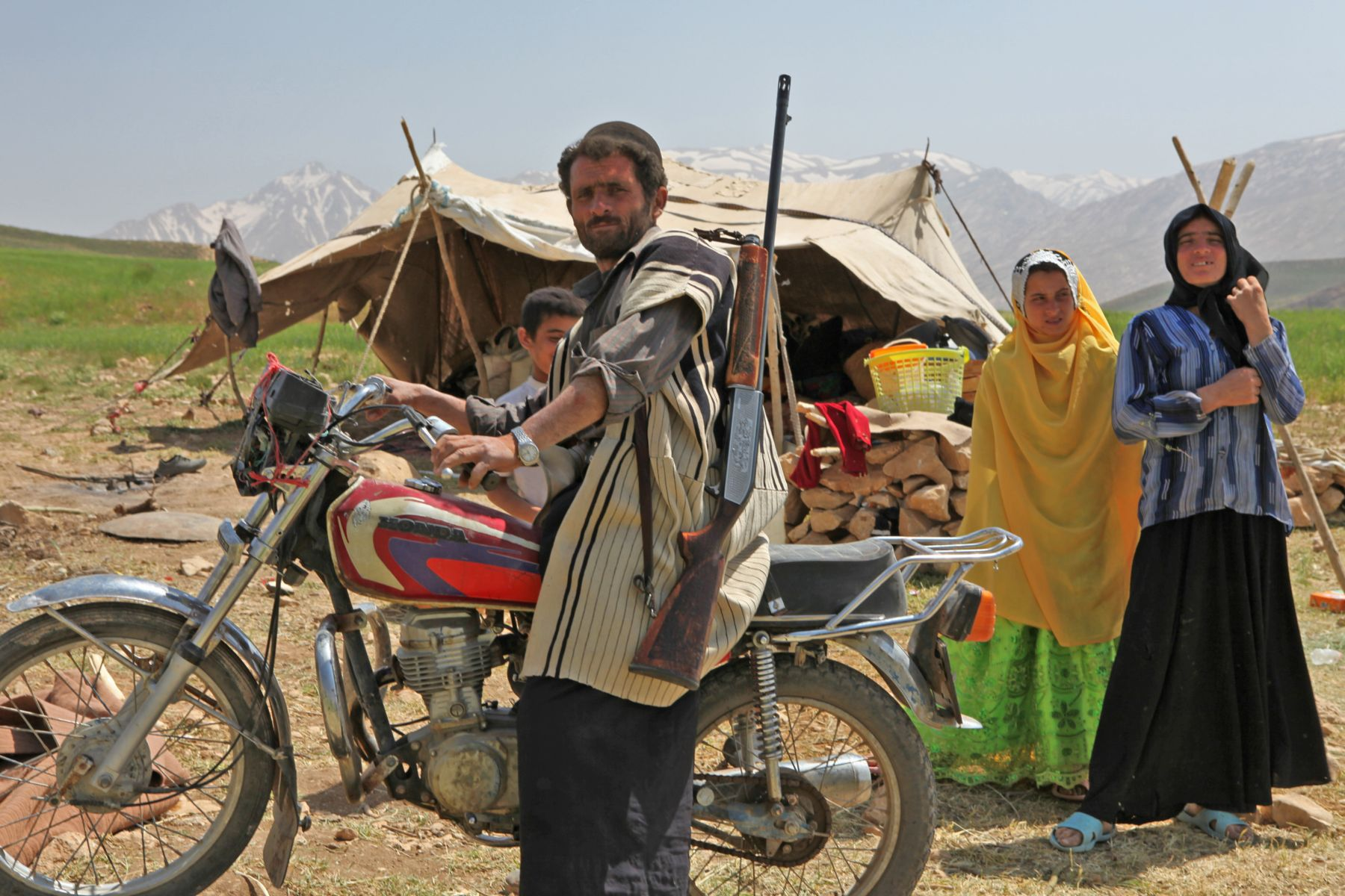 یک خانواده ایلیاتی بختیاری در استان چهارمحال بختیاری.